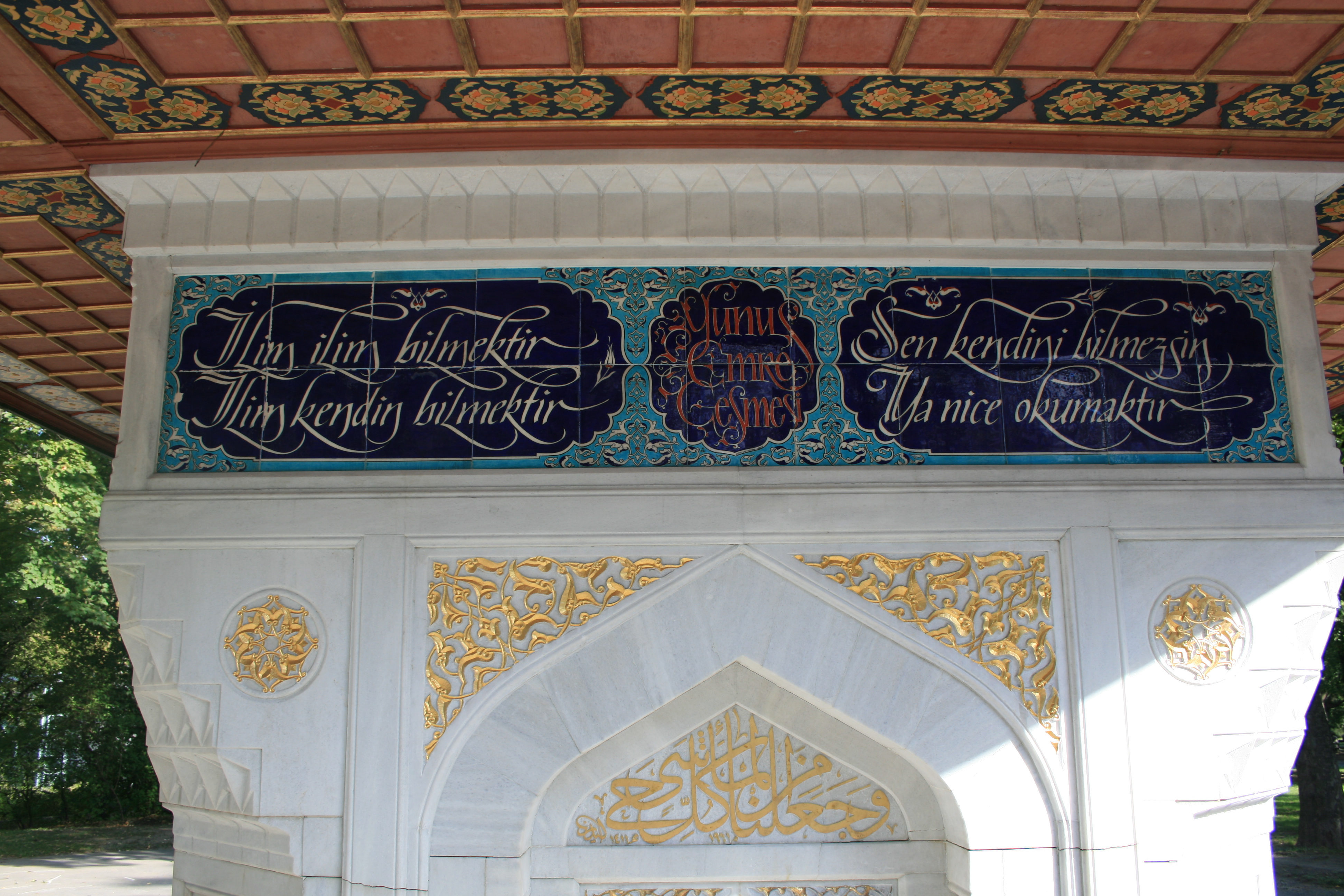 Yunus-Emre-Brunnen in Wien